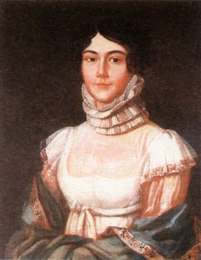 Мария Михайловна Лермонтова, урожд. Арсеньева (1795–1817 гг.), мать русского поэта М.Ю. Лермонтова.